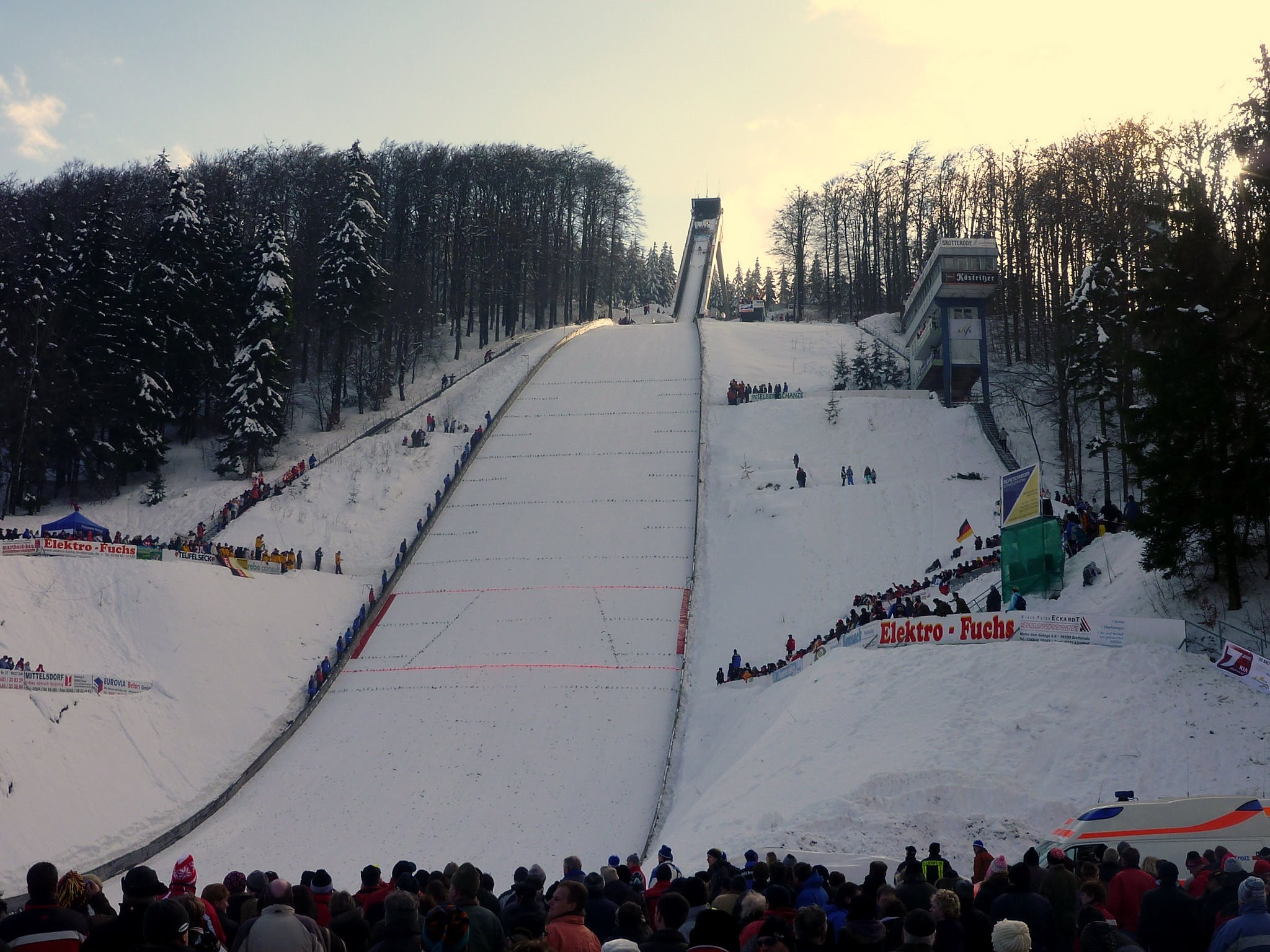 Inselbergschanze